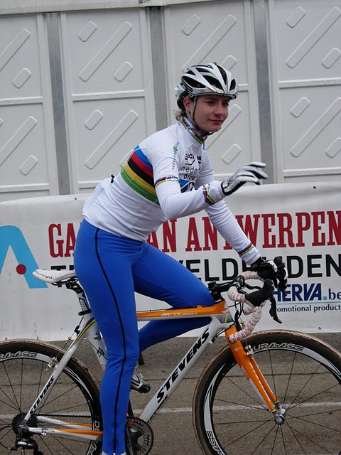 Marianne Vos ('s-Hertogenbosch, 13 mei 1987) is een Nederlandse veldrijdster en wielrenster, die momenteel in Meeuwen woont.